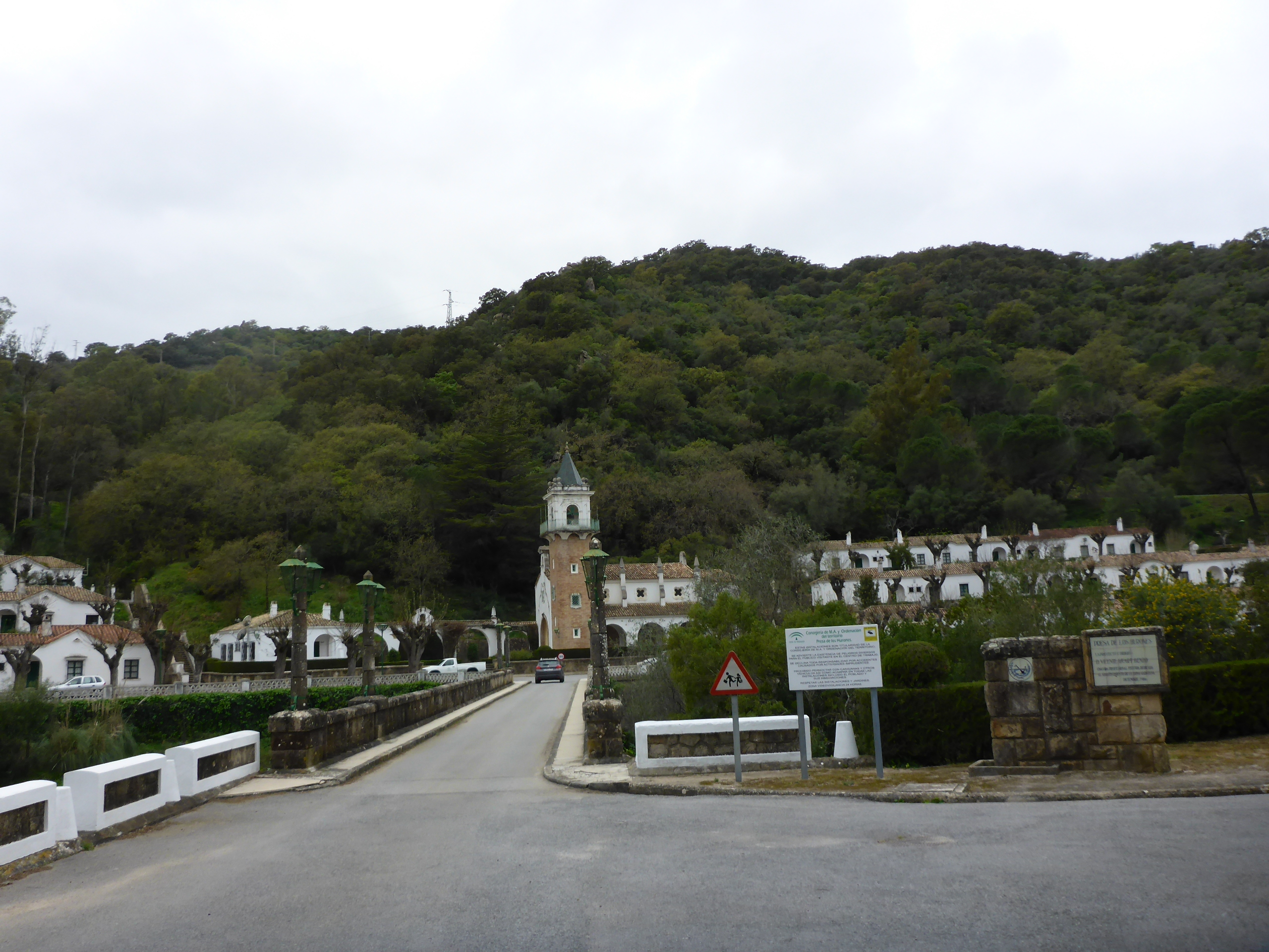 Poblado y Pantano de Los Hurones (provincia de Cádia, España)